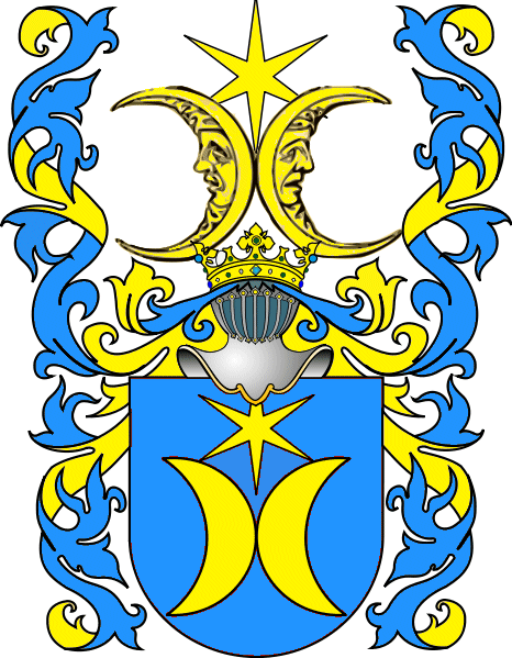 Wappen der Finck von Finckenstein